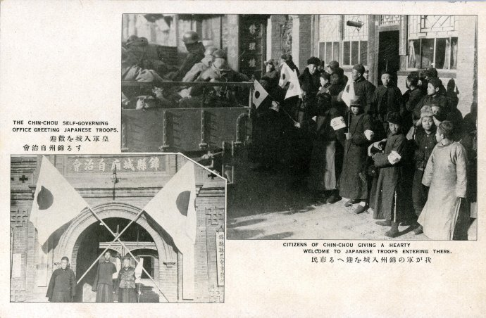 1931年9月18日事变后日军进占锦州的历史影像，出自1932年日本和歌山大正写真工艺所出版明信片《锦州方面活跃的皇军的威力》